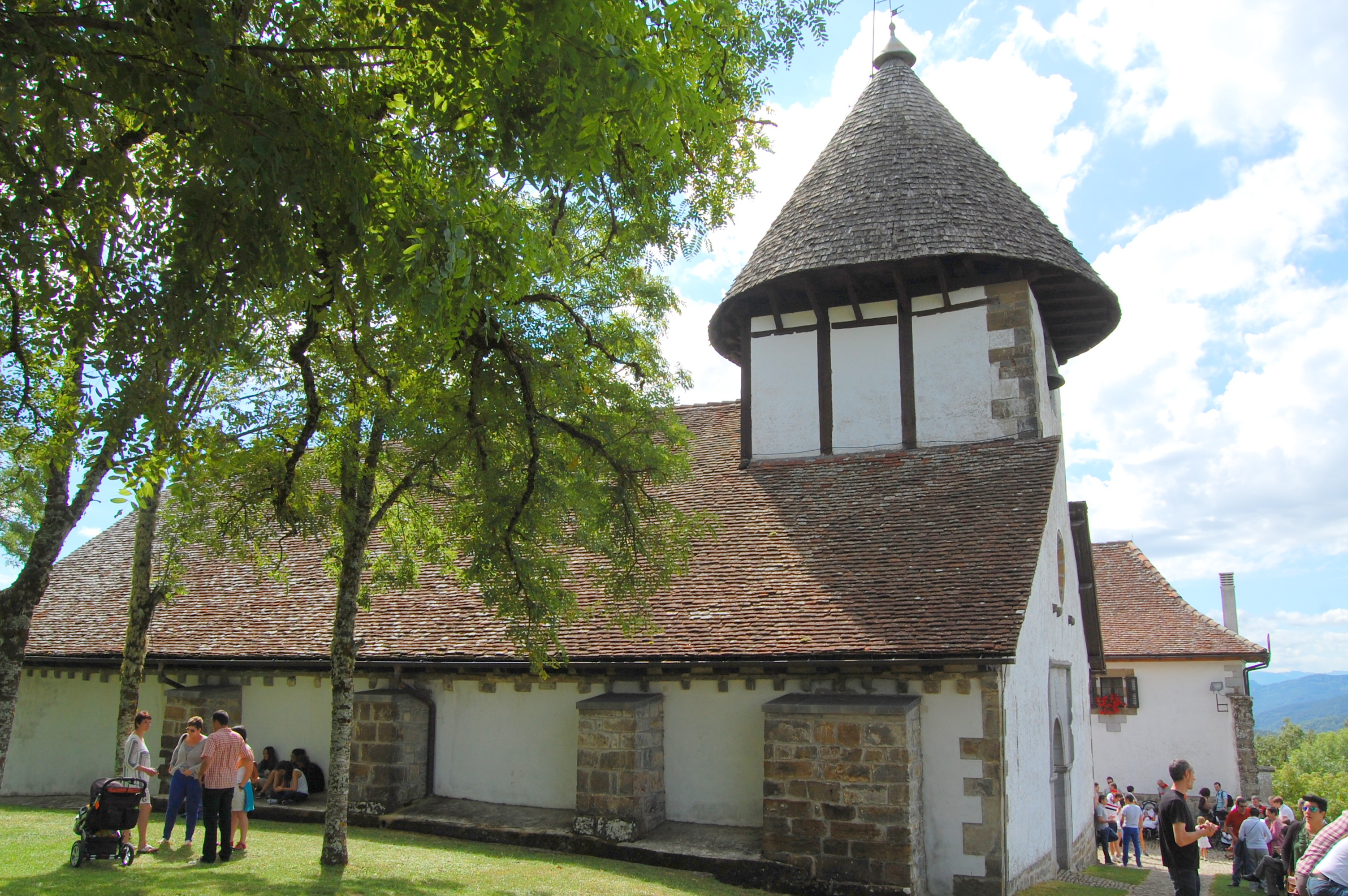 Ermita de Nuestra Señora de Muskilda Ochagavia ( Navarra ) C.F. Navarra (R.I.) - 51 - 0008290 - 00000